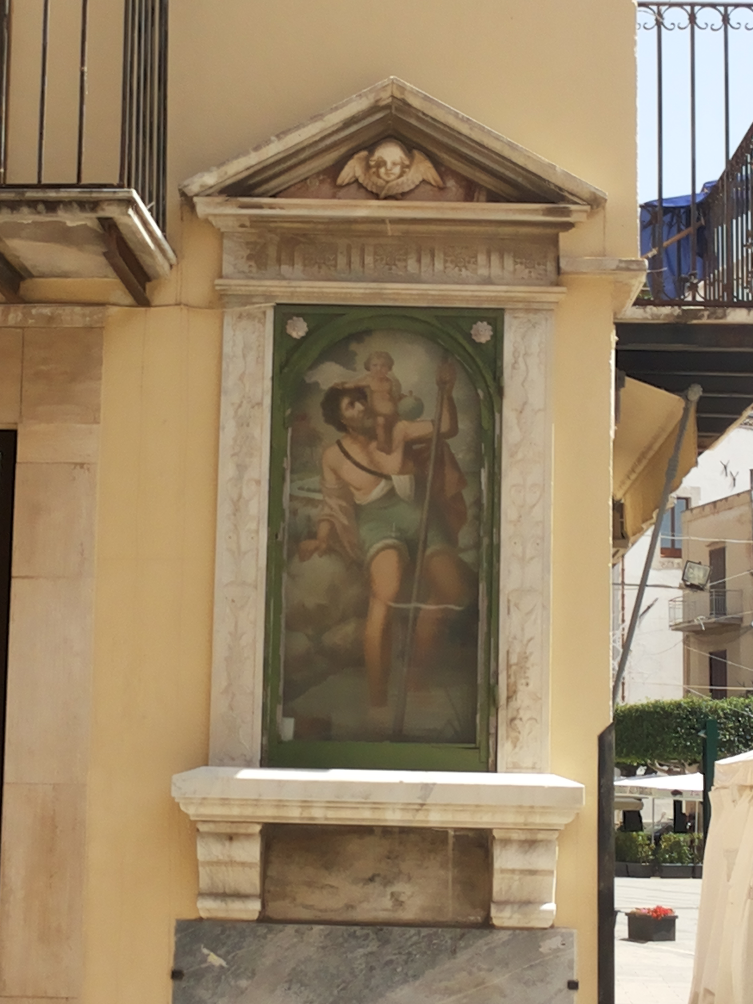 Edicola di San Cristoforo, Alcamo. Ad angolo tra Corso VI Aprile e Piazza Ciullo.